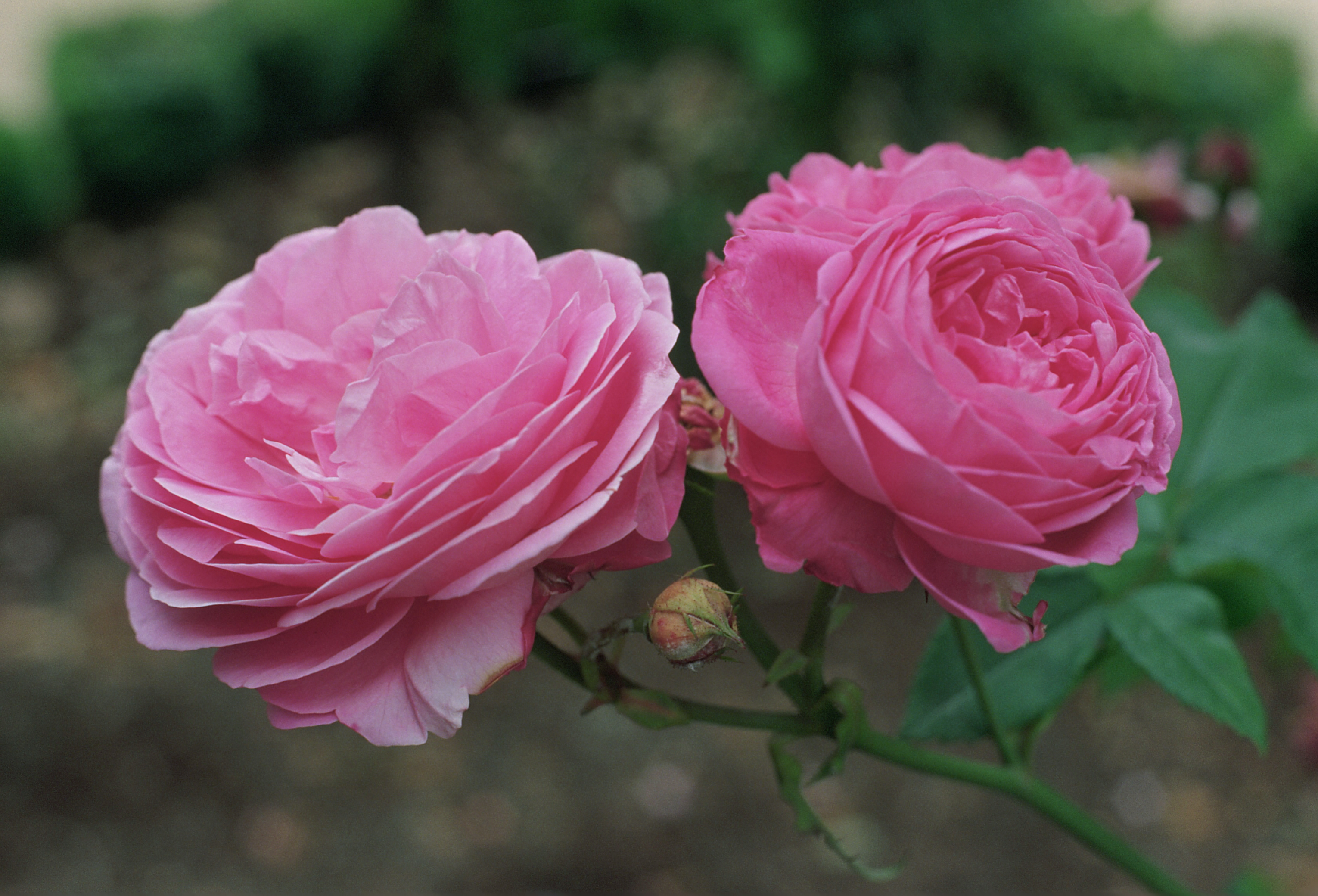 Rosa 'Louise Odier', gr. Borbonianas, sect. Chinensis. Real Jardín Botánico, Madrid